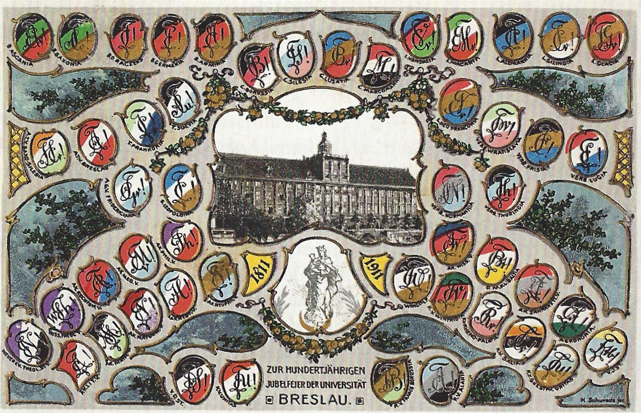 Couleurkarte „Zur 100-jährigen Jubelfeier der Universität Breslau“ mit Farben und Zirkeln von Breslauer Studentenverbindungen. Farblithographie 8,9 x 13,8 cm, 1911; H. Schurade fec.; Lithographie und Druck Gebr. Keil, Halle a. S.; Verlag Max Ruge, Halle a. S.